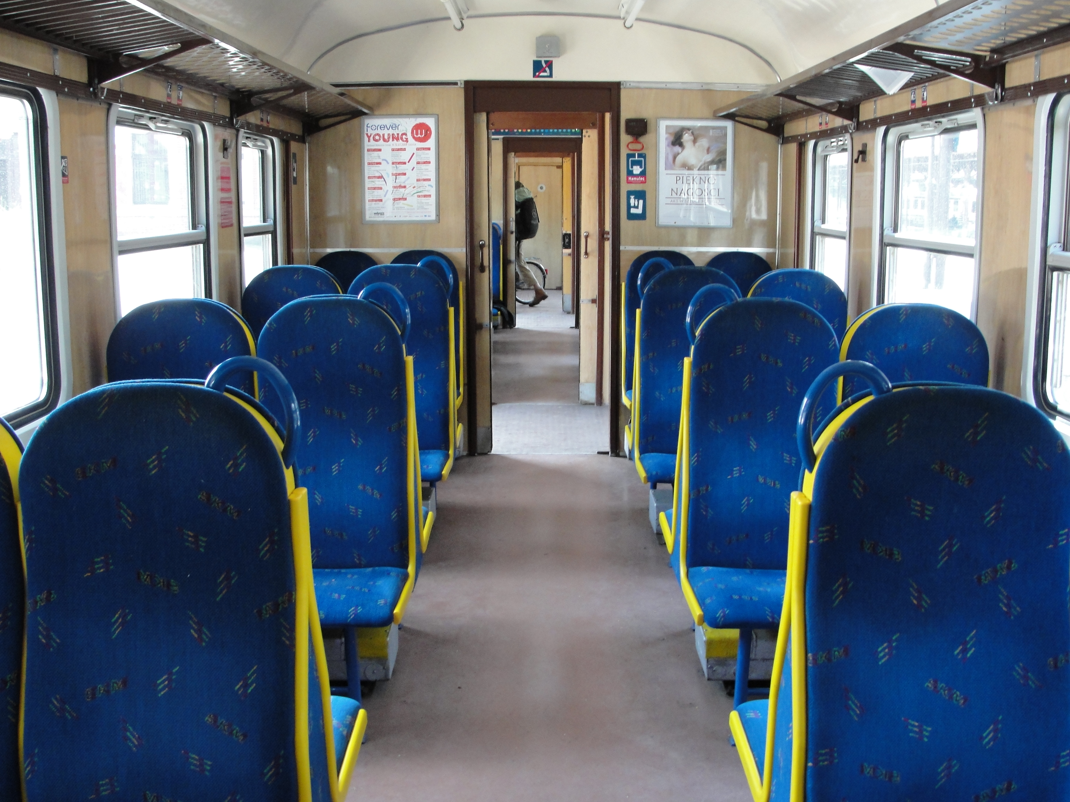 wnętrze wyremontowanej jednostki EN57 na stacji Gdańsk Główny